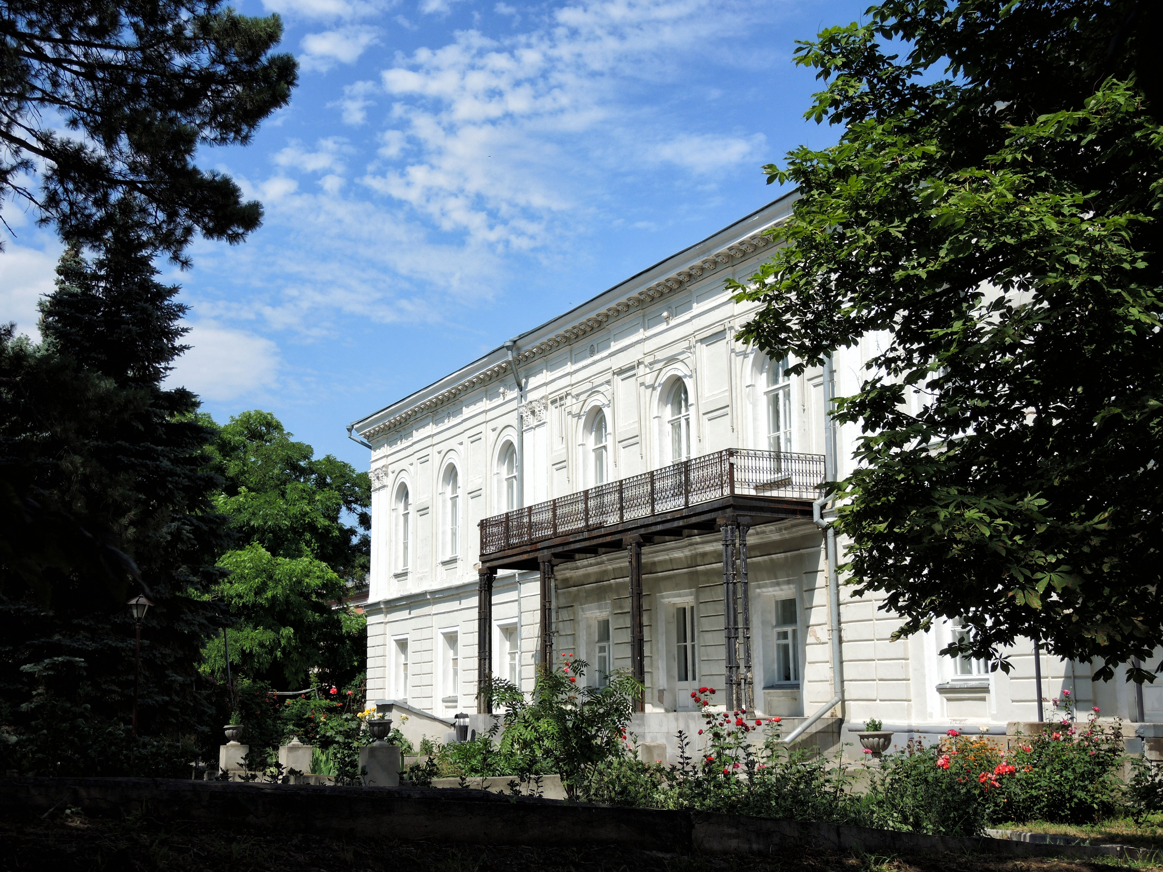 Здание атаманского дворца: проспект Карла Маркса, 7, Новочеркасск, Ростовская область